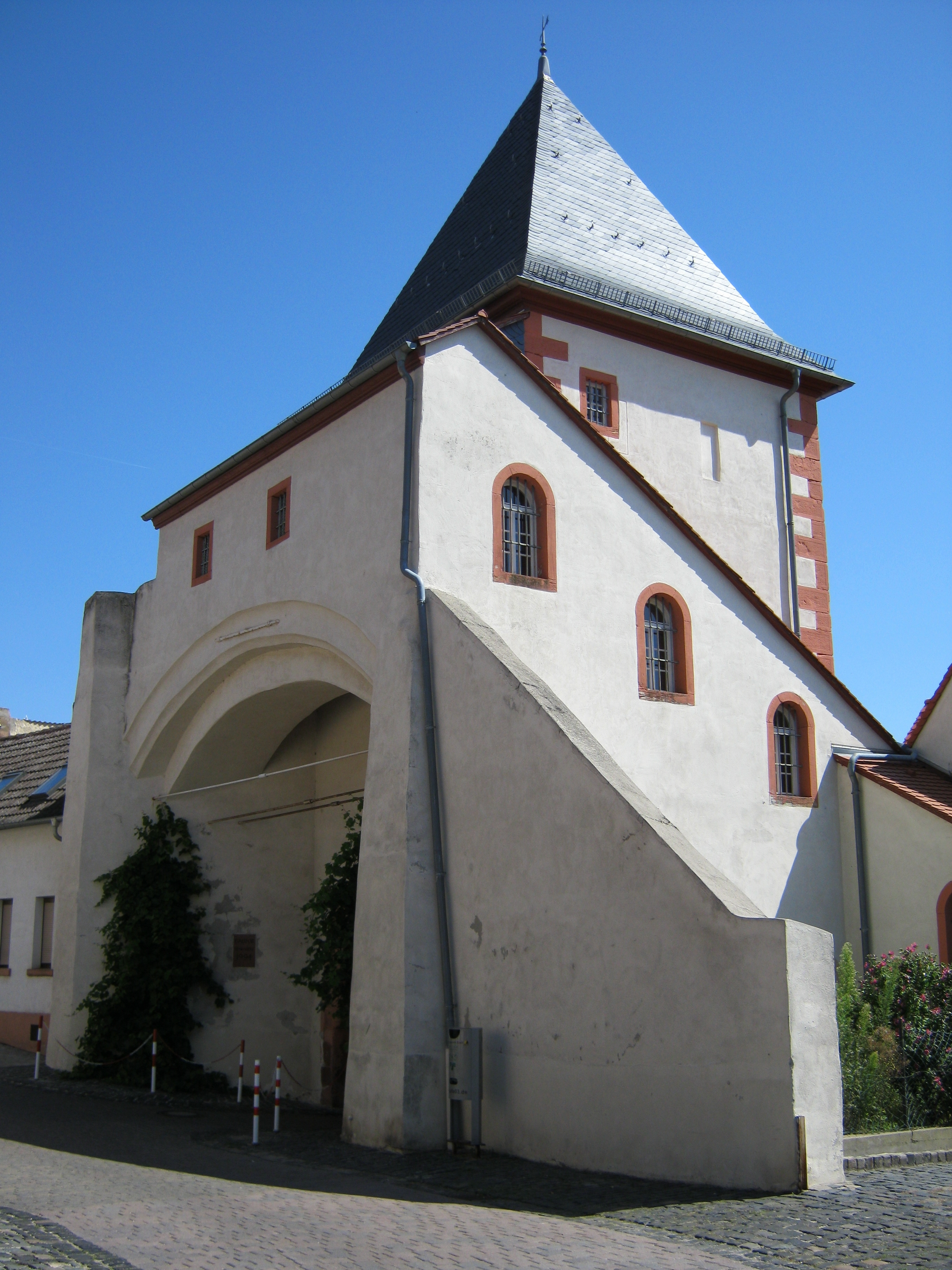 Das Gautor im rheinhessischen Oppenheim in Rheinland-Pfalz von außen gesehen.